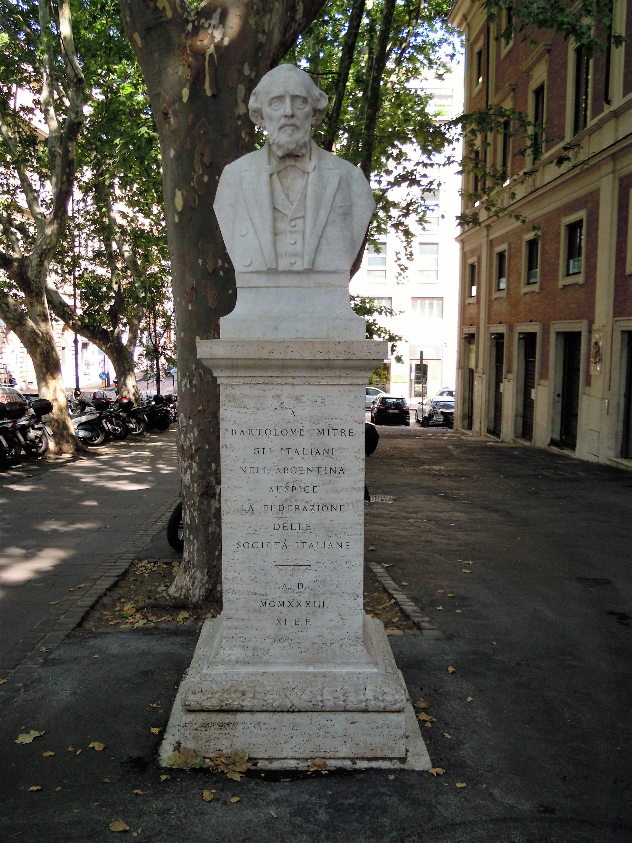 Roma, busto di Bartolomé Mitre in piazza dell'Esquilino, fronte Ambasciata argentina (1933)